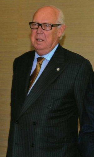 ヴィットーリオ・エマヌエーレ・ディ・サヴォイア